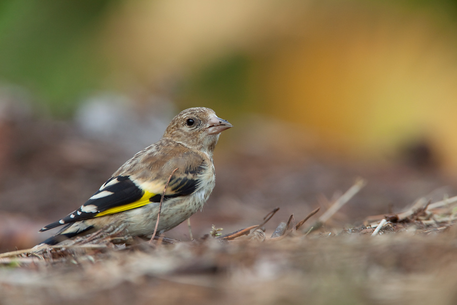 Carduelis carduelis, young